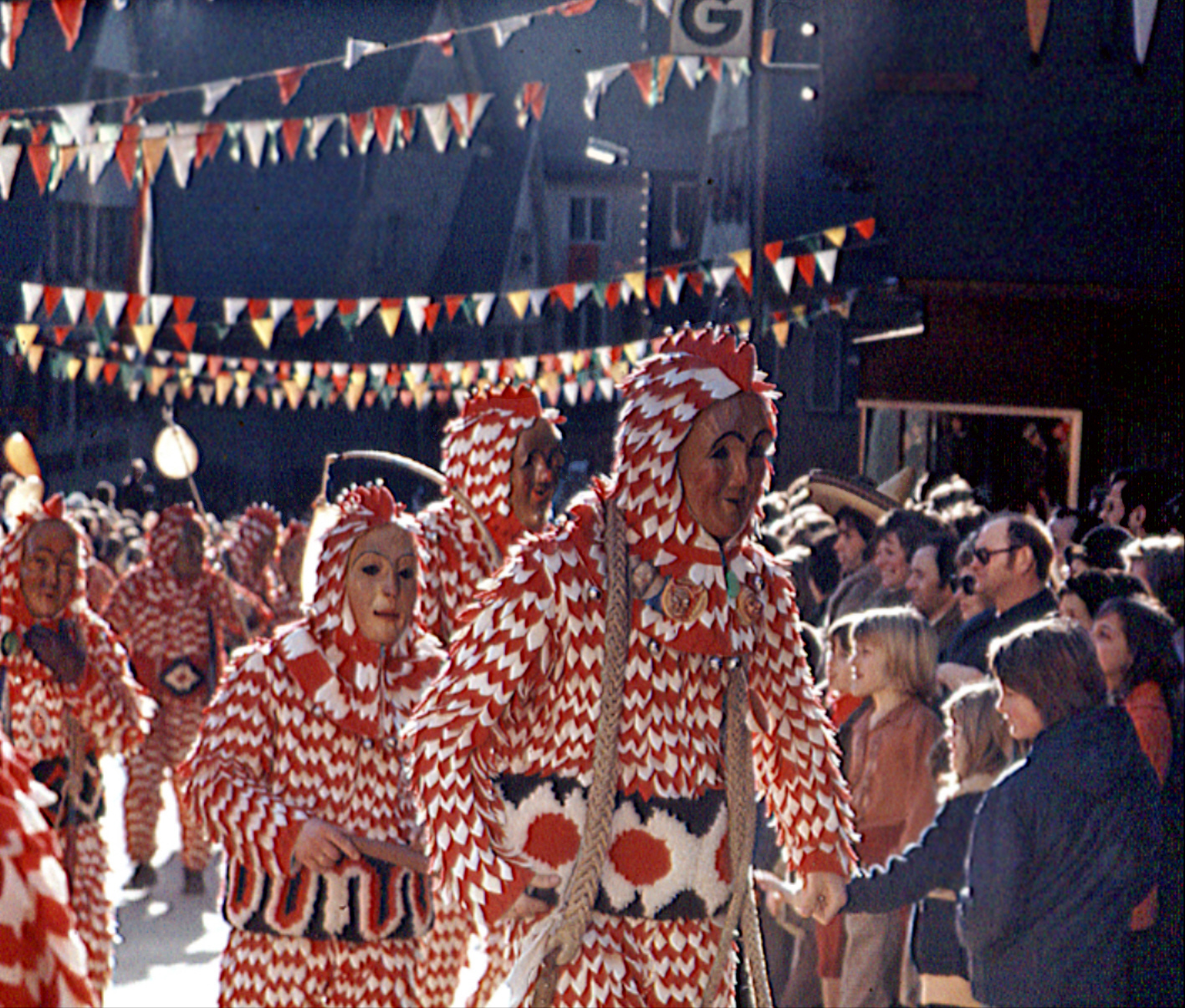 Großes Narrentreffen 1974 in Riedlingen/Donau Plätzlerzunft Weingarten, Figur „Plätzler“